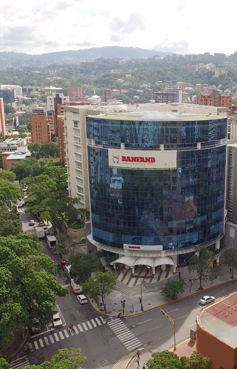 Torre Banfanb en Caracas.